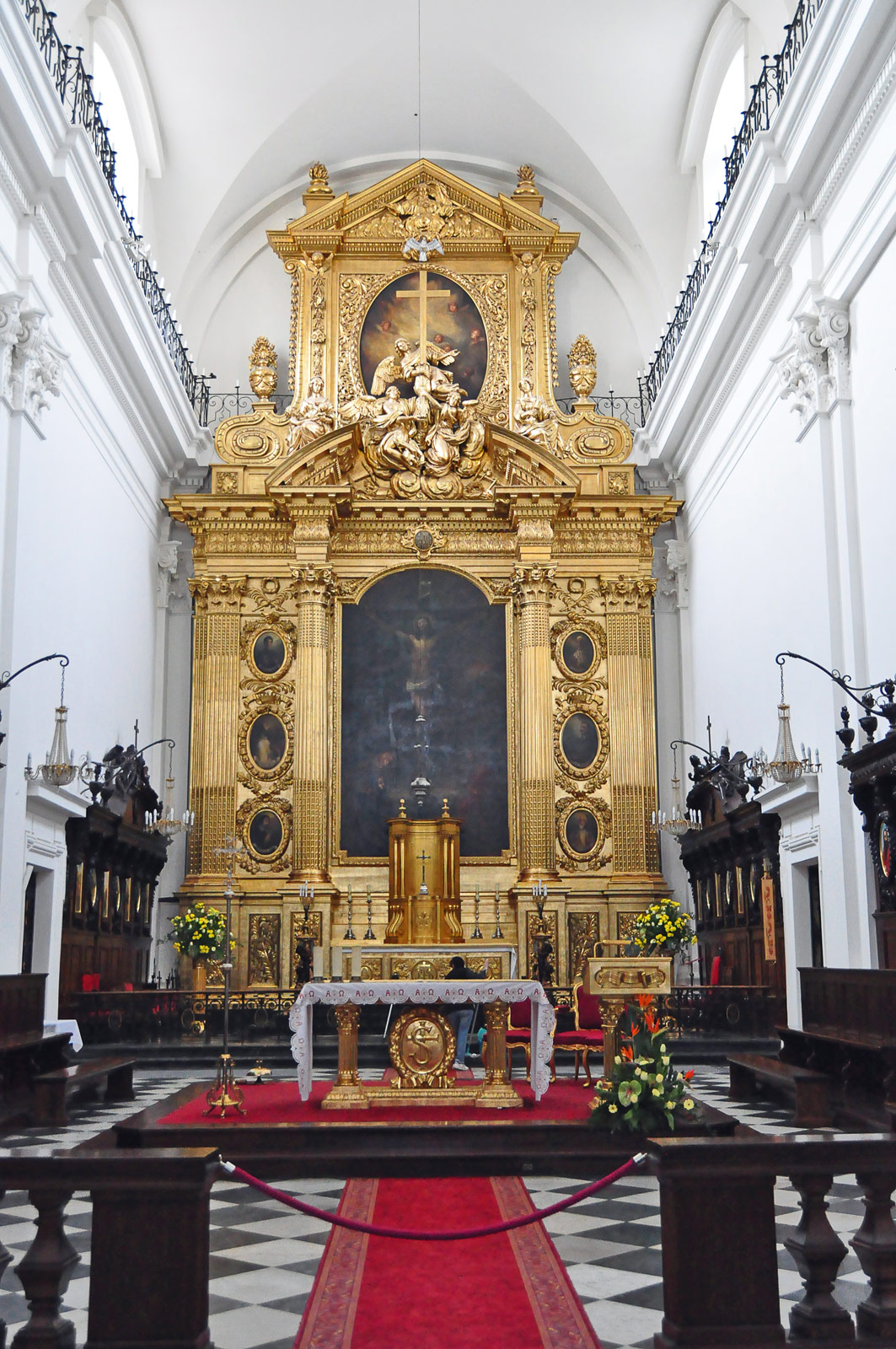 Wnętrze Bazyliki Świętego Krzyża w Warszawie